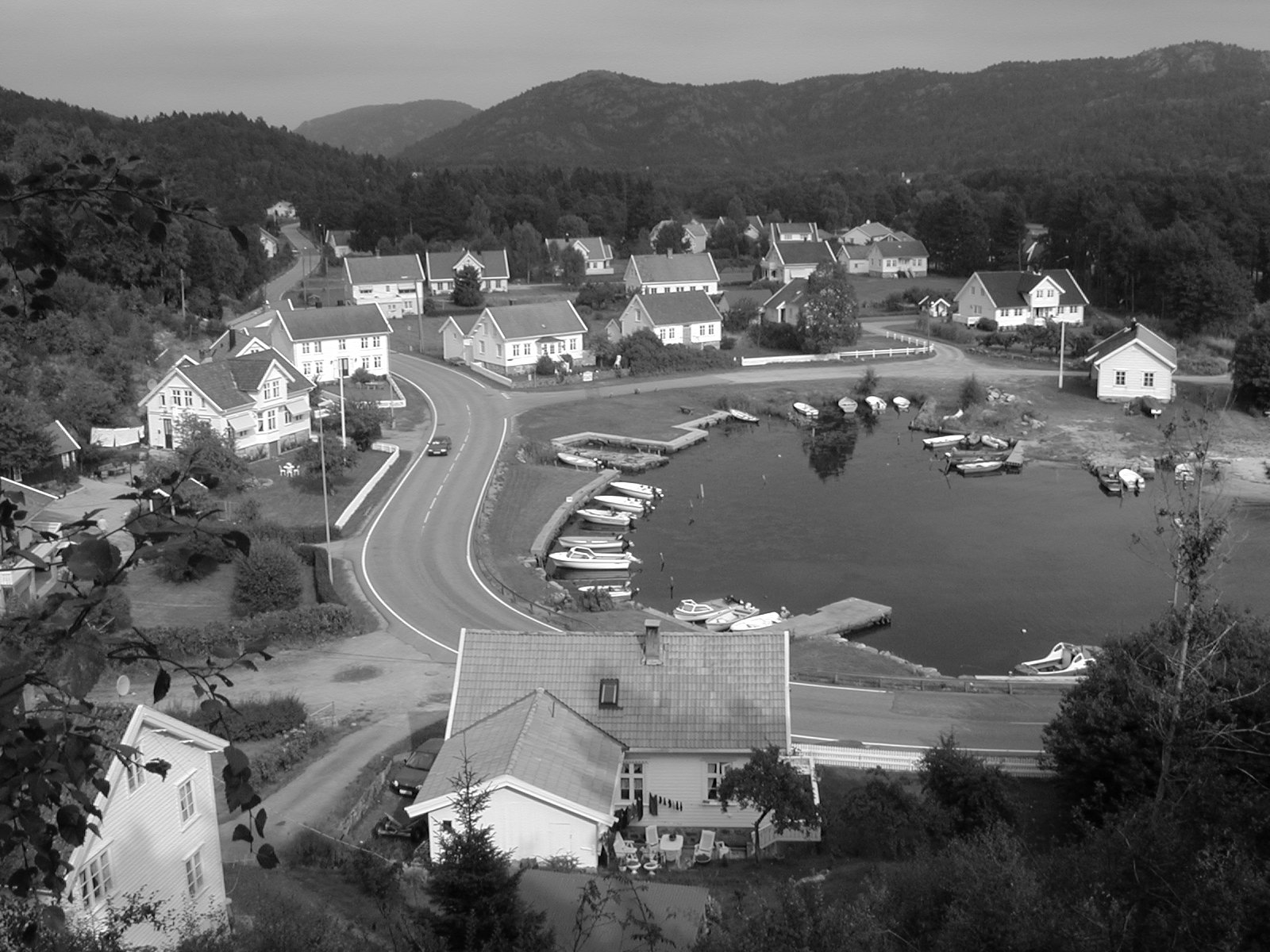 Snig in Lindesnes, Norway